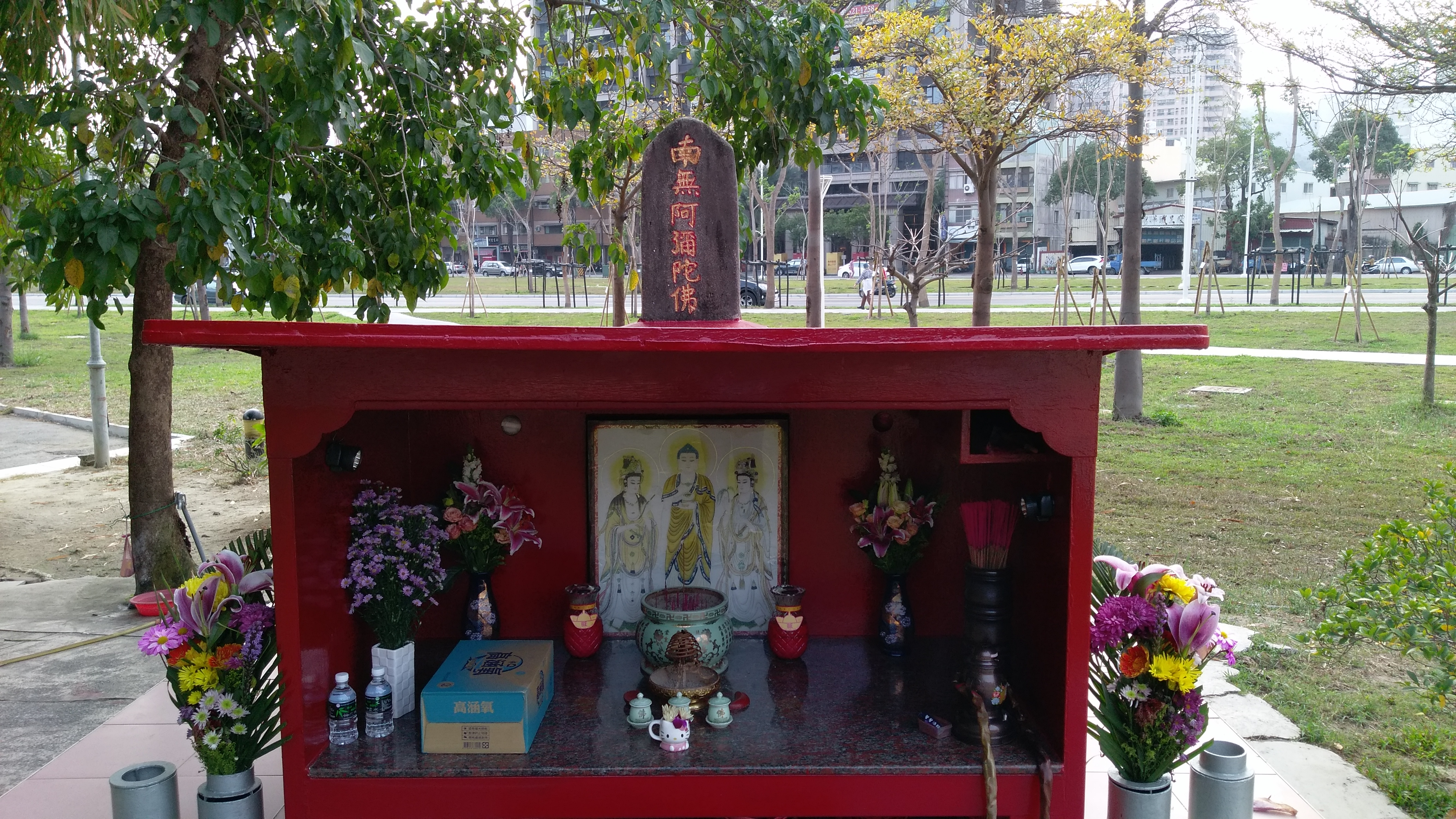 中文（台灣）: 鼓山阿彌陀佛碑和碑前的西方三聖畫像